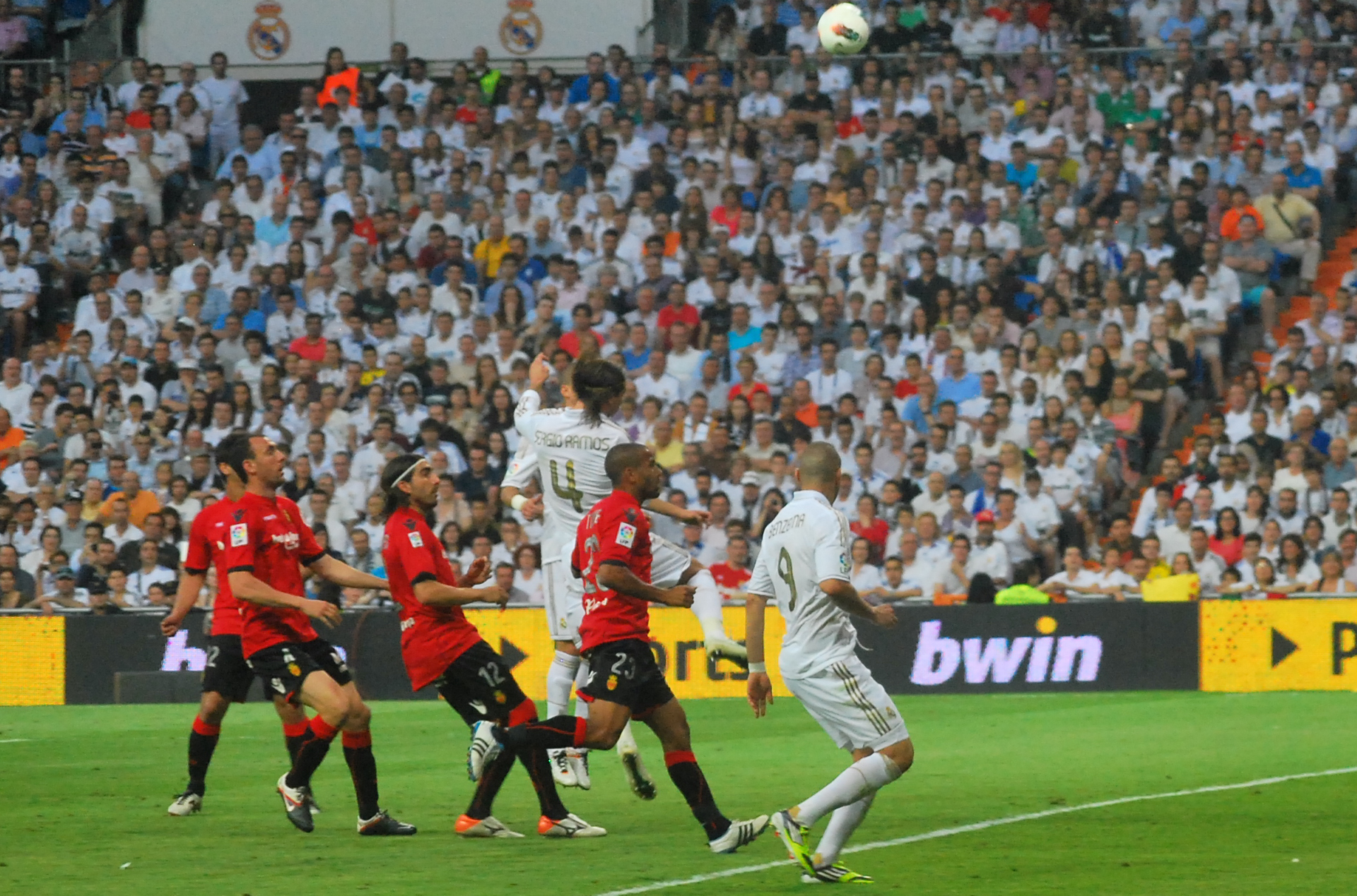 Final de la Liga 32 del Real Madrid